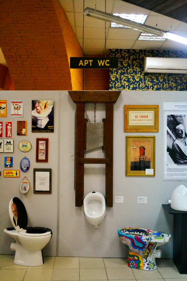 Художні експонати Музею історії туалету